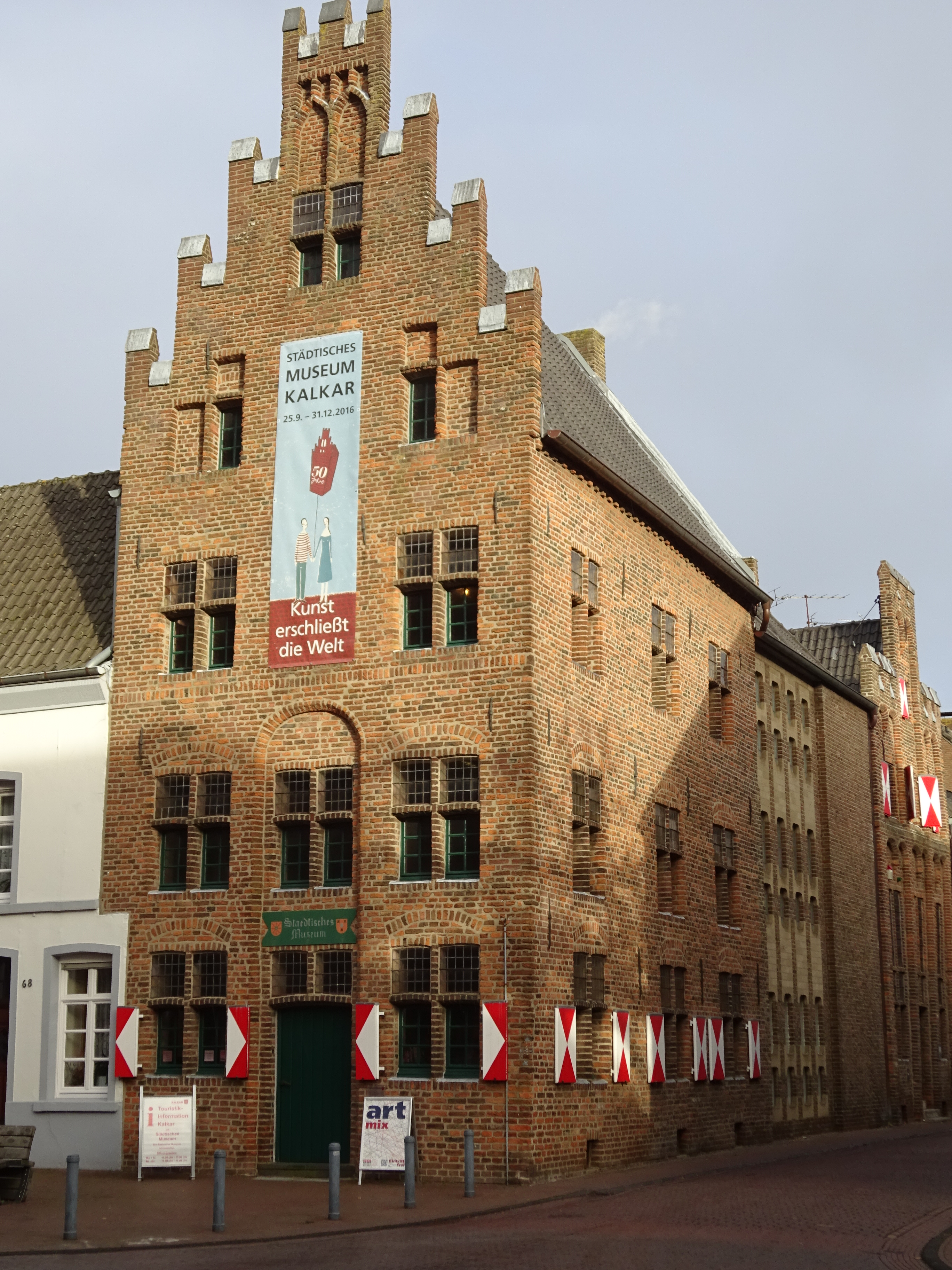 Kalkar, Grabenstraße 66. Städtisches Museum Kalkar